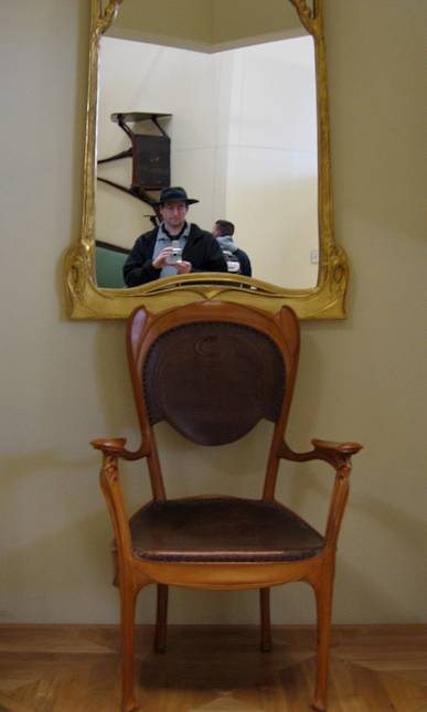 Hector Guimard, Spiegel (um 1910) und Sessel (um 1905); Musée d'Orsay, Paris.